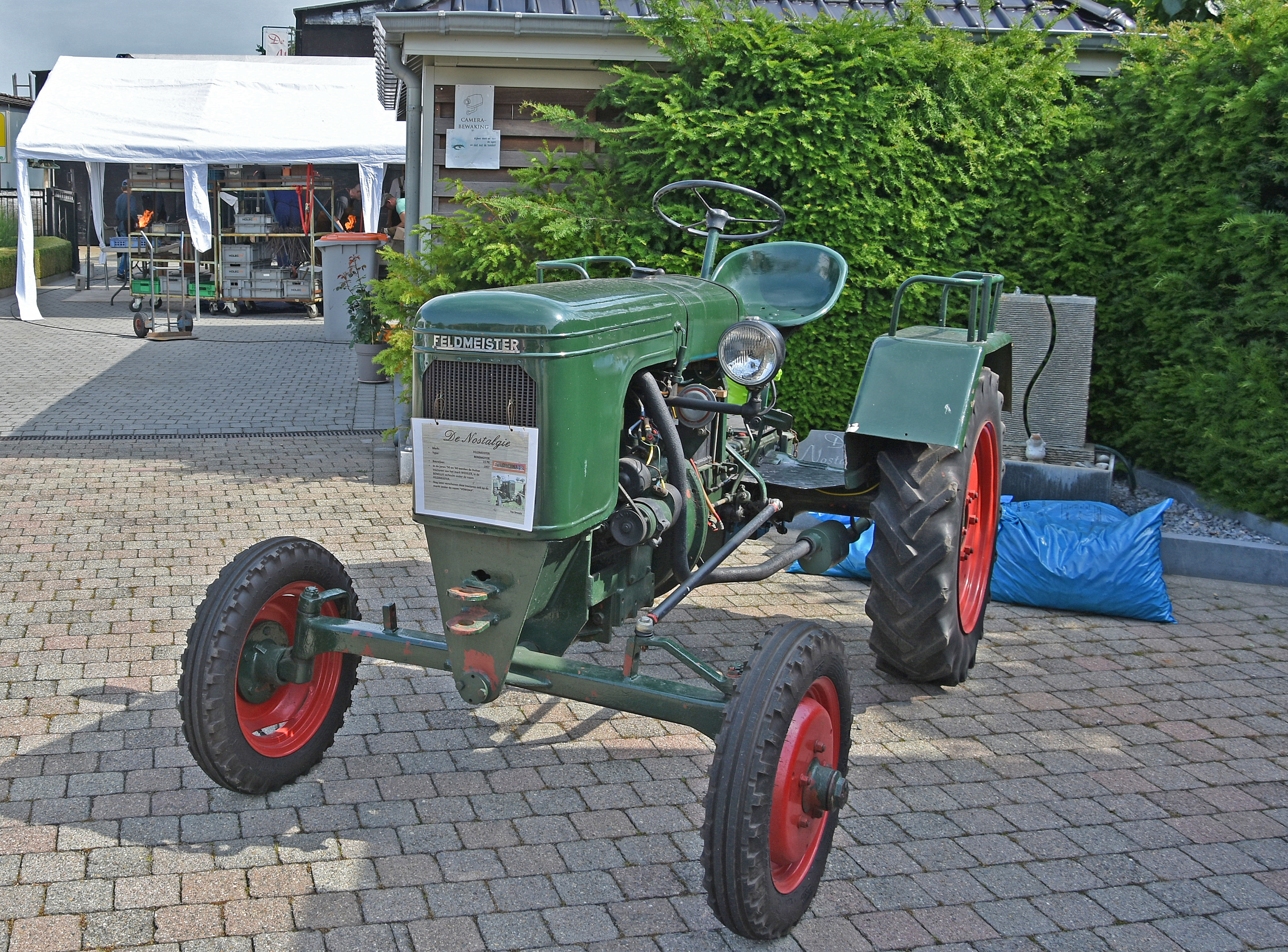 Landbouwmuseum De Nostalgie - Uikhoven 10-06-2019 10-41-22